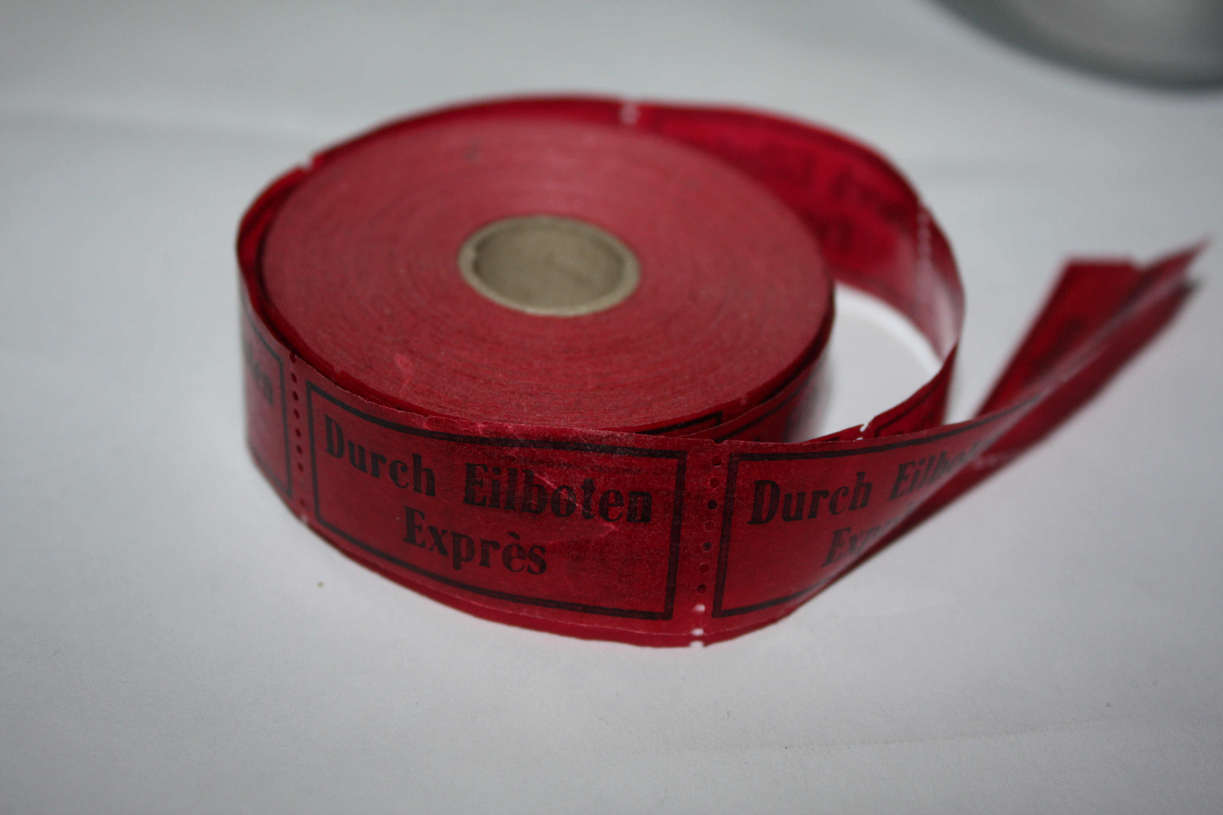 Eine Rolle rote Eilzustellungsmarken / Durch Eilboten / Exprés